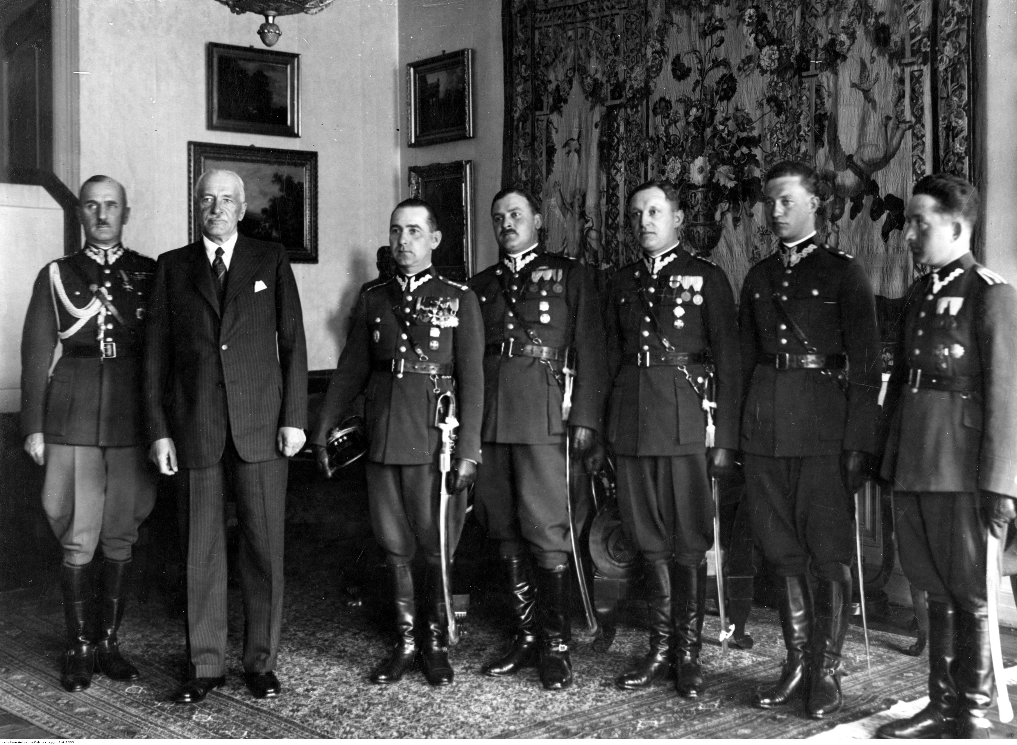 Delegacja 6 Pułku Artylerii Ciężkiej na audiencji u prezydenta RP Ignacego Mościckiego; 10 kwietnia 1934 r. Widoczni od lewej: pułkownik Jan Głogowski, Ignacy Mościcki, pułkownik Wojciech Fyda, major Ignacy Schrage, kapitan Edward Reguła, podporucznik Tysi, starszy ogniomistrz Saban. Koncern Ilustrowany Kurier Codzienny - Archiwum Ilustracji. Sygnatura: 1-A-1395